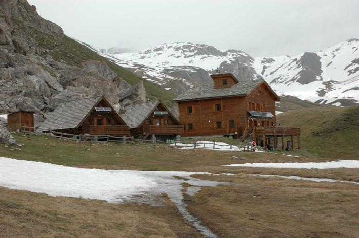 vue du refuge